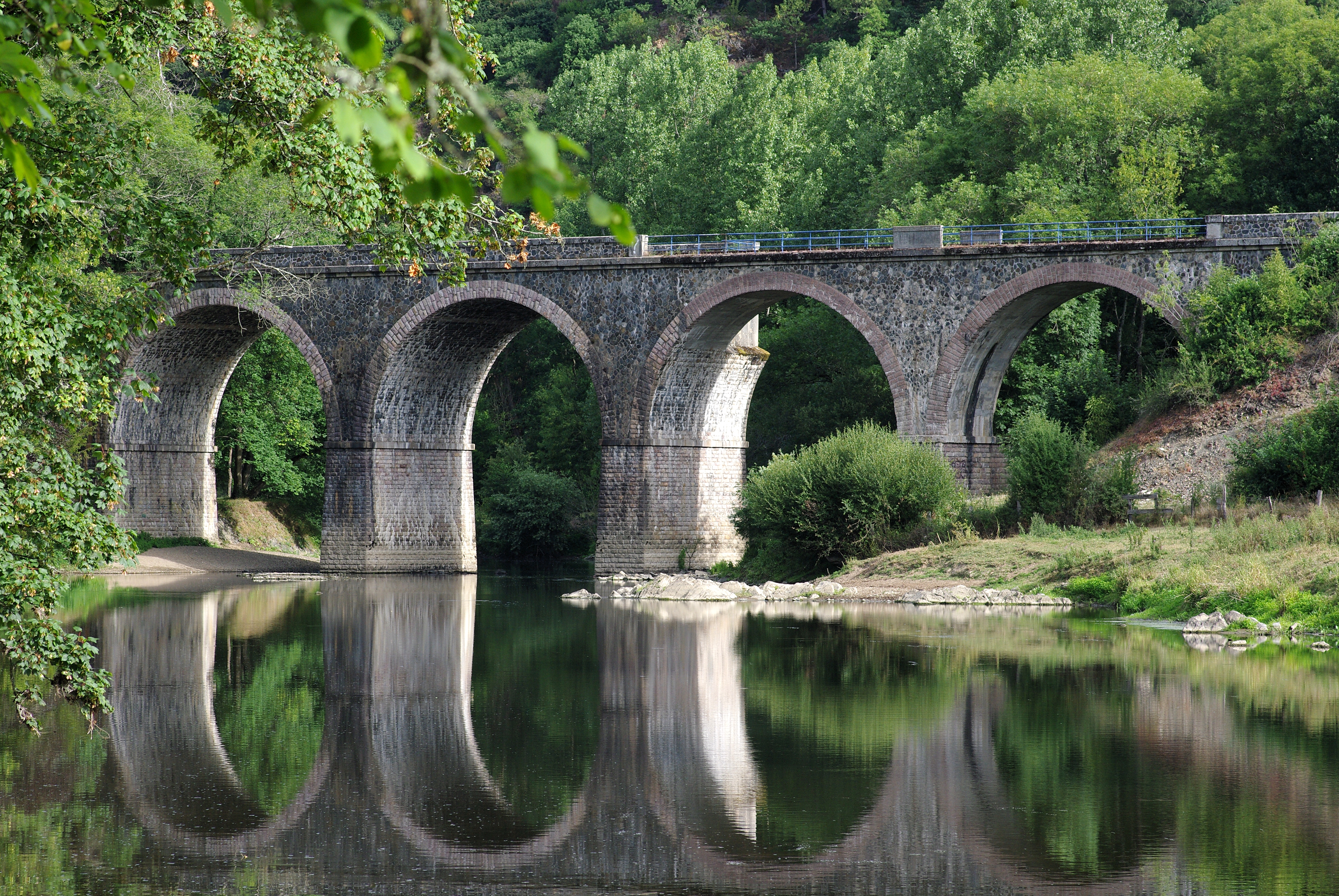 viaduc Sainte-Anne, le pont ferroviaire qui traverse l'Orne en lisière de la forêt de Grimbosq sur la limite administrative des communes de Maizet et de Grimbosq.